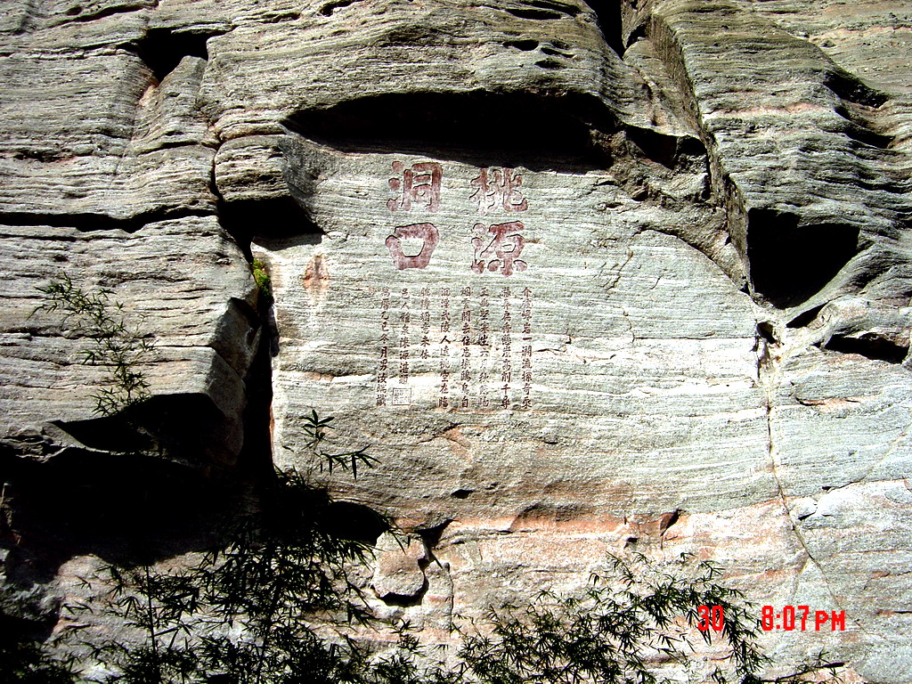 桃源洞